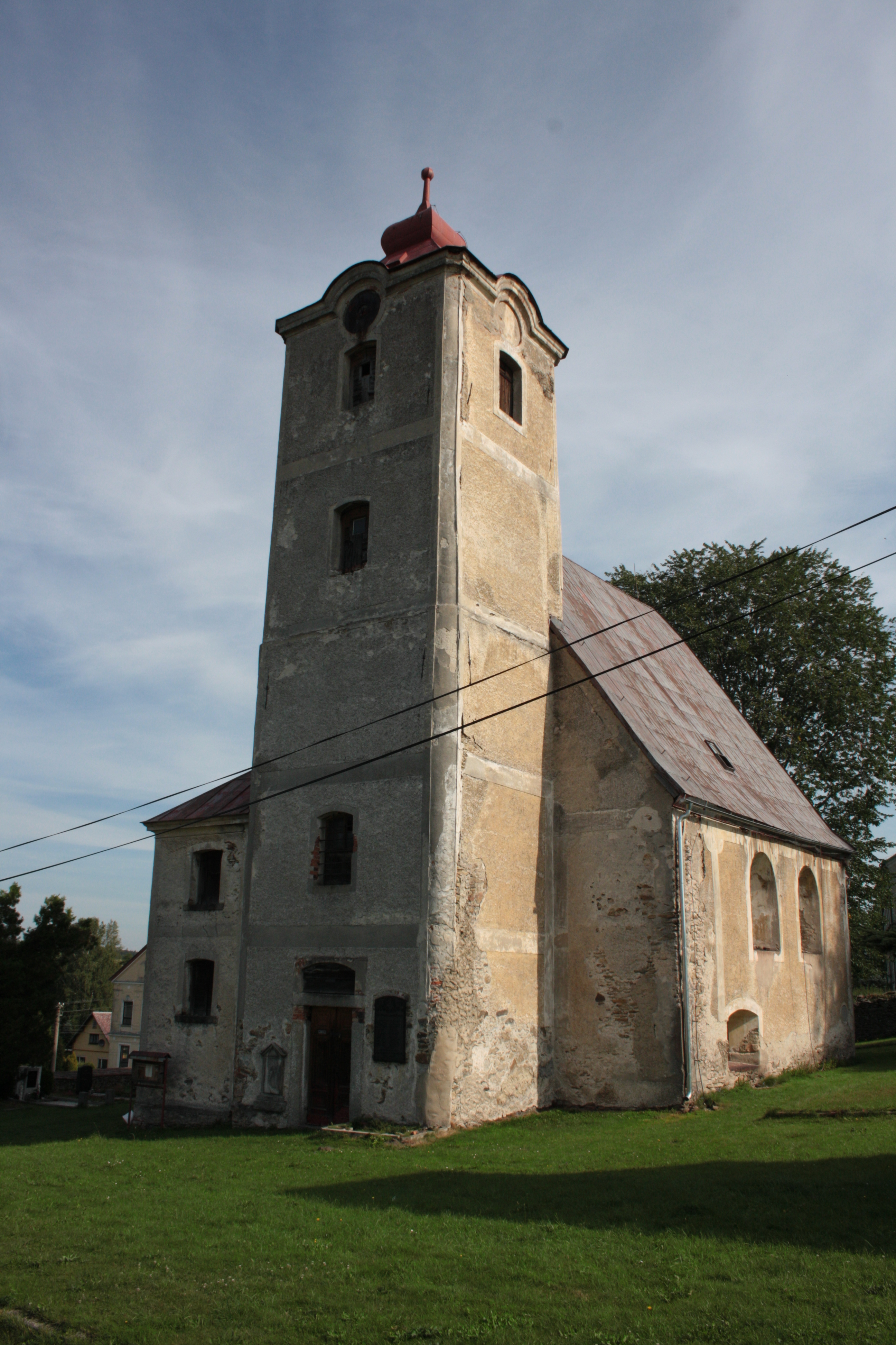 This photograph was taken with a DSLR from WMCZ's Camera grant. Kostel Neposkvrněného Početí Panny Marie v Horní Řasnici (pohled od jihu).